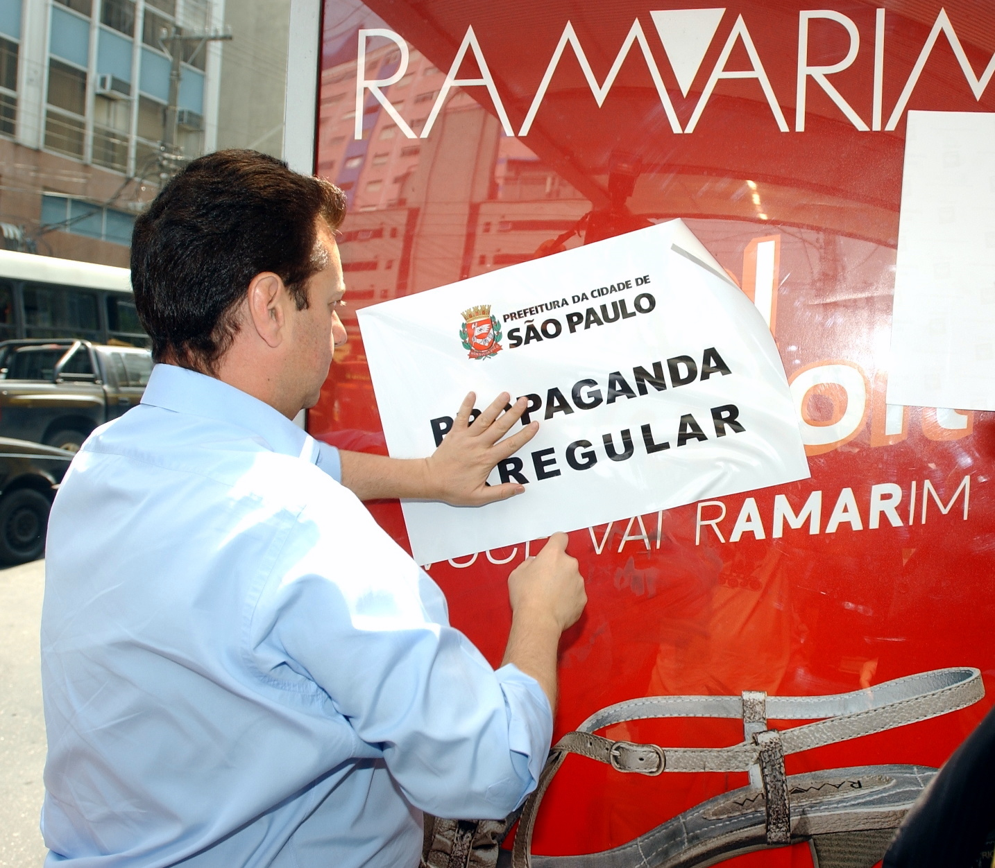 Gilberto Kassab